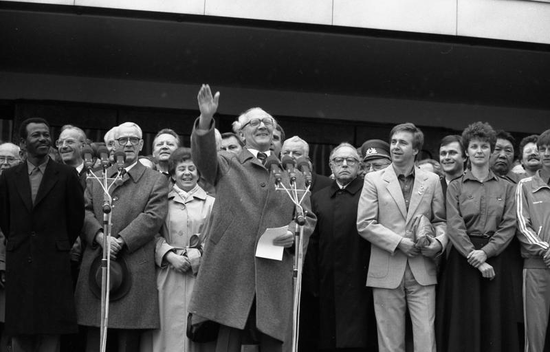 Berlin, XI.Parteitag der SED, FDJ-Manifestation ADN-ZB/Mittelstädt 5.5.86 Berlin: XI. Parteitag der SED Erich Honecker dankte den Teilnehmern der FDJ-Manifestation, die am 18. April 1986 auf dem Marx-Engels-Platz stattfand, für die beispielhaften Ergebnisse im Ernst-Thälmann-Aufgebot. [(r. neben Honecker) Erich Mielke, vorn: 2.v.l. Willi Stoph] Abgebildete Personen: Mielke, Erich: Minister für Staatssicherheit, Armeegeneral, Politbüro des Zentralkomitees (ZK) der SED, DDR (GND 118977490) Honecker, Erich: Staatsratsvorsitzender, Generalsekretär des ZK der SED, DDR (GND 118553399) Stoph, Willi: Ministerpräsident, Staatsratsvorsitzender, Armeegeneral, SED, DDR